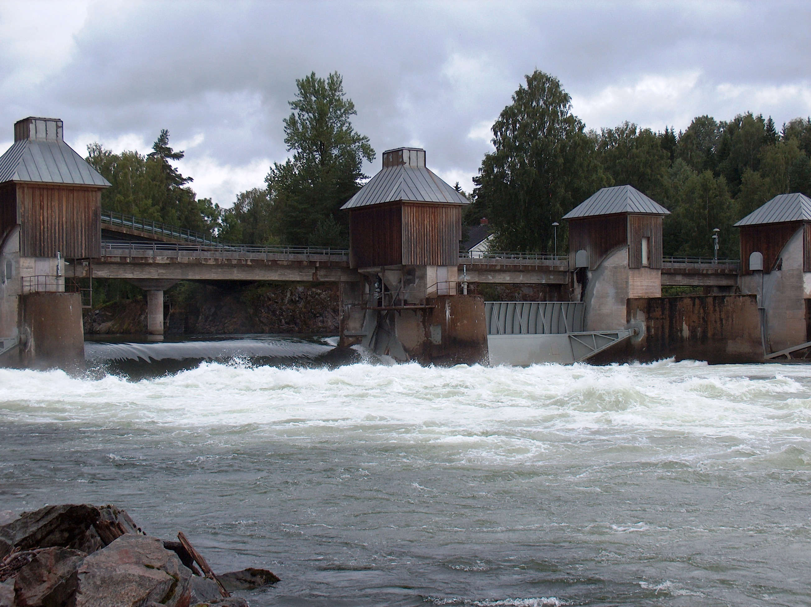 Svanfossen in Vorma river in Norway. Photo: Svein Harkestad, Bergen in Norway